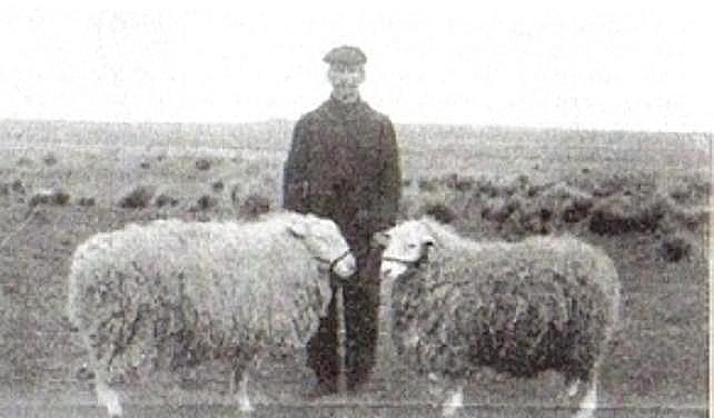 Trabajador rural en los campos de Merlo, provincia de Buenos Aires.